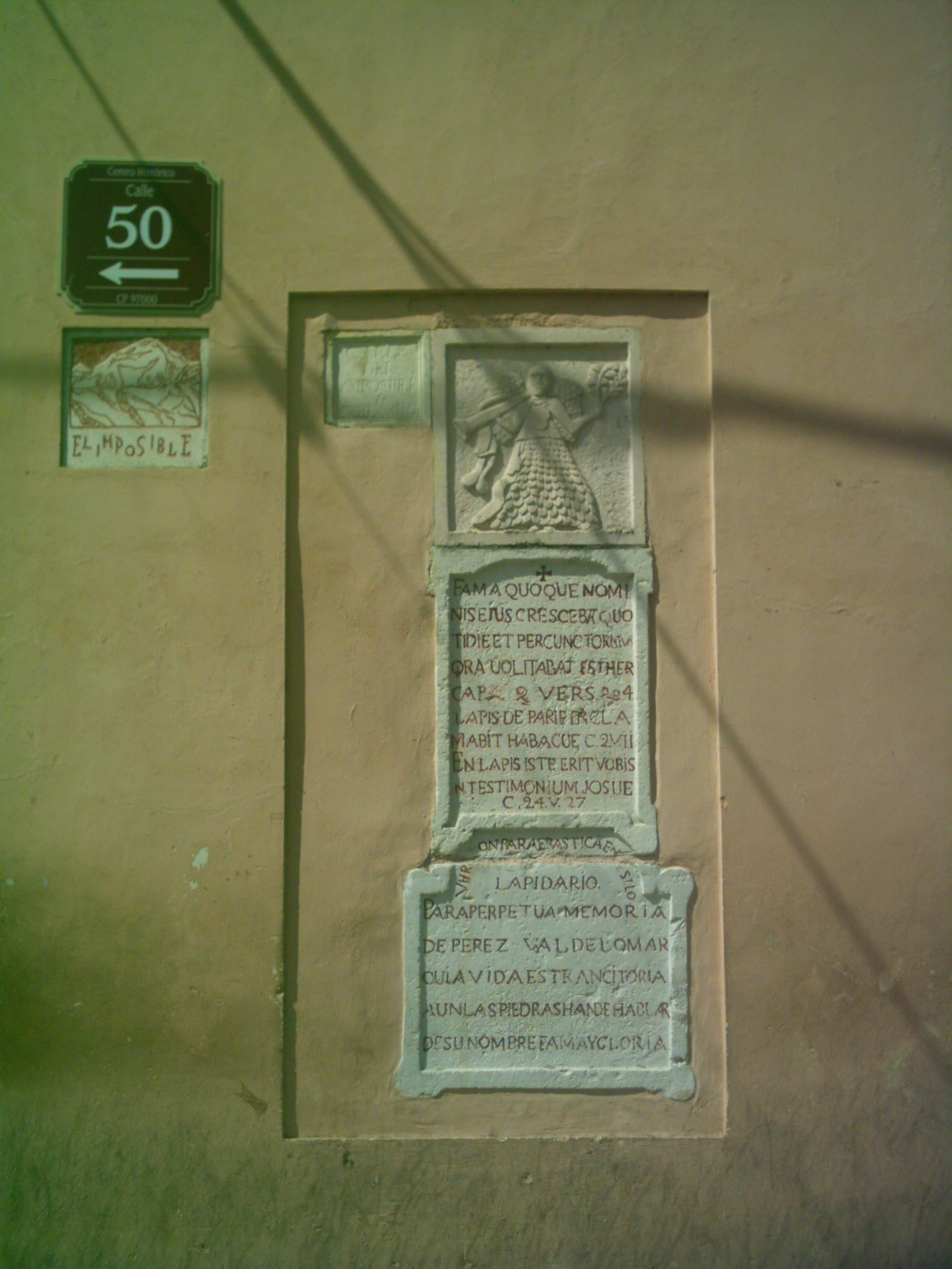 Placa que señala el sitio donde existió el cerro "El Imposible" el cual fue demolido por órdenes de Don Benito Pérez Valdelomar, entonces gobernador de Yucatán en 1800. Para conmemorar dicha proeza, se colocó esta placa conmemorativa. Consta de cuatro piezas: la de arriba ostenta la imagen de un ángel sosteniendo una trompeta y una rama, la de enmedio dice "FAMA QUOQUE NOMINIS EIUS CRESCEBAT QUOTIDIE ET PER CUNCTORUM ORA UOLIBAT ESTHER CAP.9 VERS.4 (su fama iba por todas las provincias, Ester 9:4) LAPIS DE PARIETE CLAMABIT HABACUC C.2 V.11 (la piedra clamará desde el muro, Habacuc 2:7) LAPIS ISTE ERIT VOBIS IN TESTIMONIUM IOSUE C.24 V.17 (he aquí esta piedra nos servirá de testigo, Josué 24:27)", la de abajo "VER[SI]ON PARAFRASTICA EN S[ANTISI]MO LAPIDARIO. PARA PERPETUA MEMORIA DE PEREZ VALEDOMAR QU[E] LA VIDA ES TRANCITORIA (transitoria) AUN LAS PIEDRAS HAN DE HABLAR DE SU NOMBRE FAMA Y GLORIA", a la izquierda del conjunto un bloque con la incripción "CALLE DEL IMPOCIBLE (imposible) Y CE (se) BENCIO (venció)".